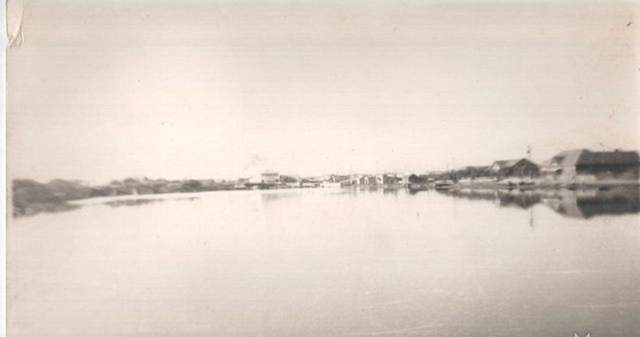 Красногорск, Сахалинская область, панорама центра Красногорска - вид со стороны реки Чёрной,в 60- е годы XX века